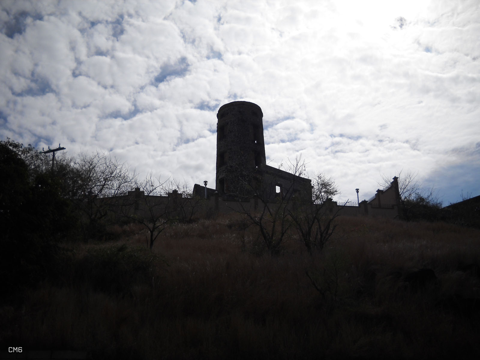 La Tour Koenig Windmill